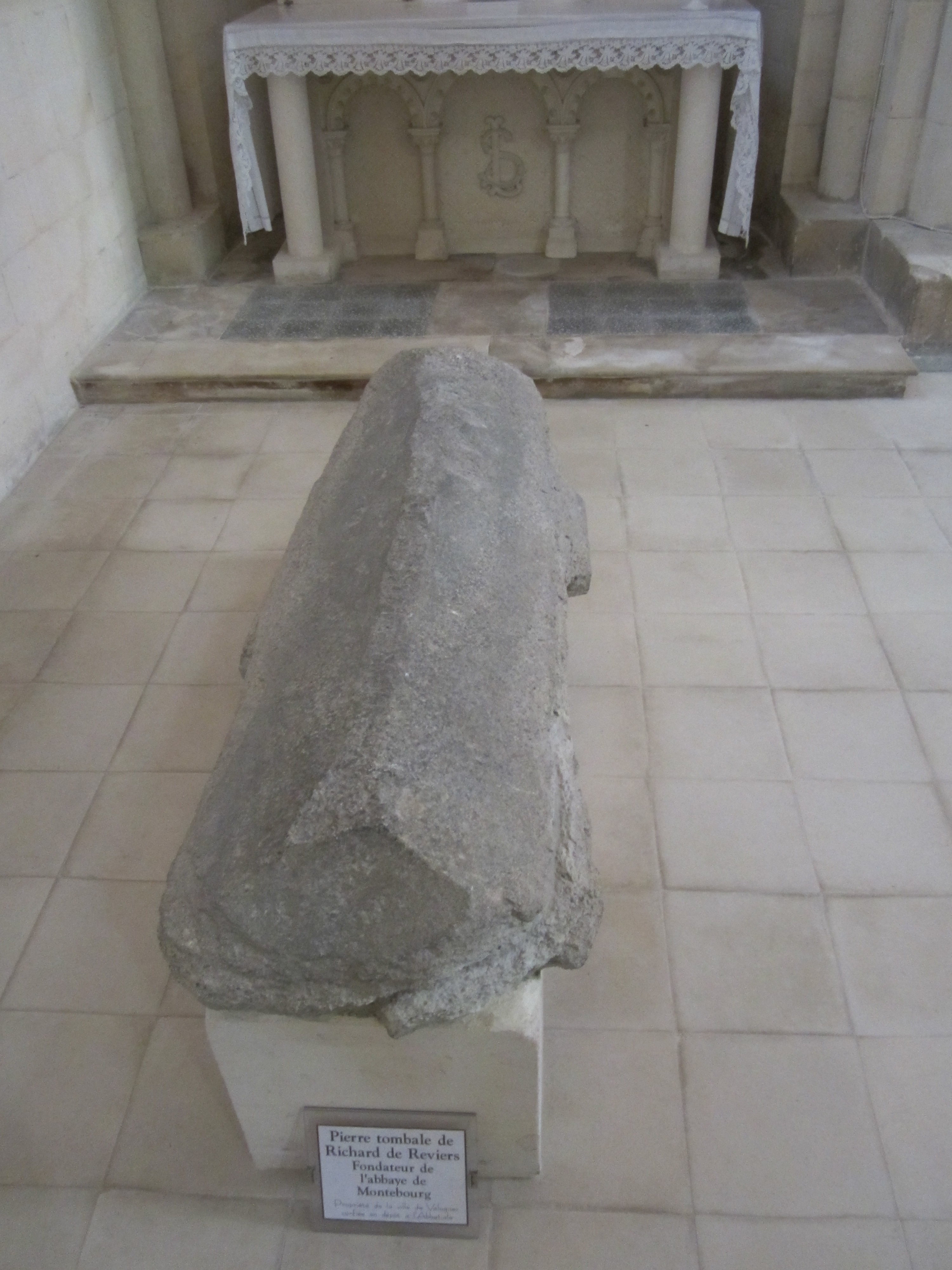 Abbaye de Montebourg